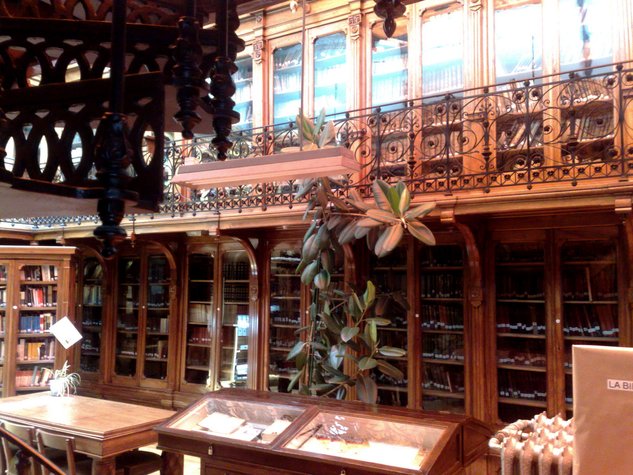 Vista de la biblioteca del edificio M-1 de la Escuela Técnica Superior de Ingenieros de Minas de Madrid (España), en el nº 21 de la Calle de Ríos Rosas.